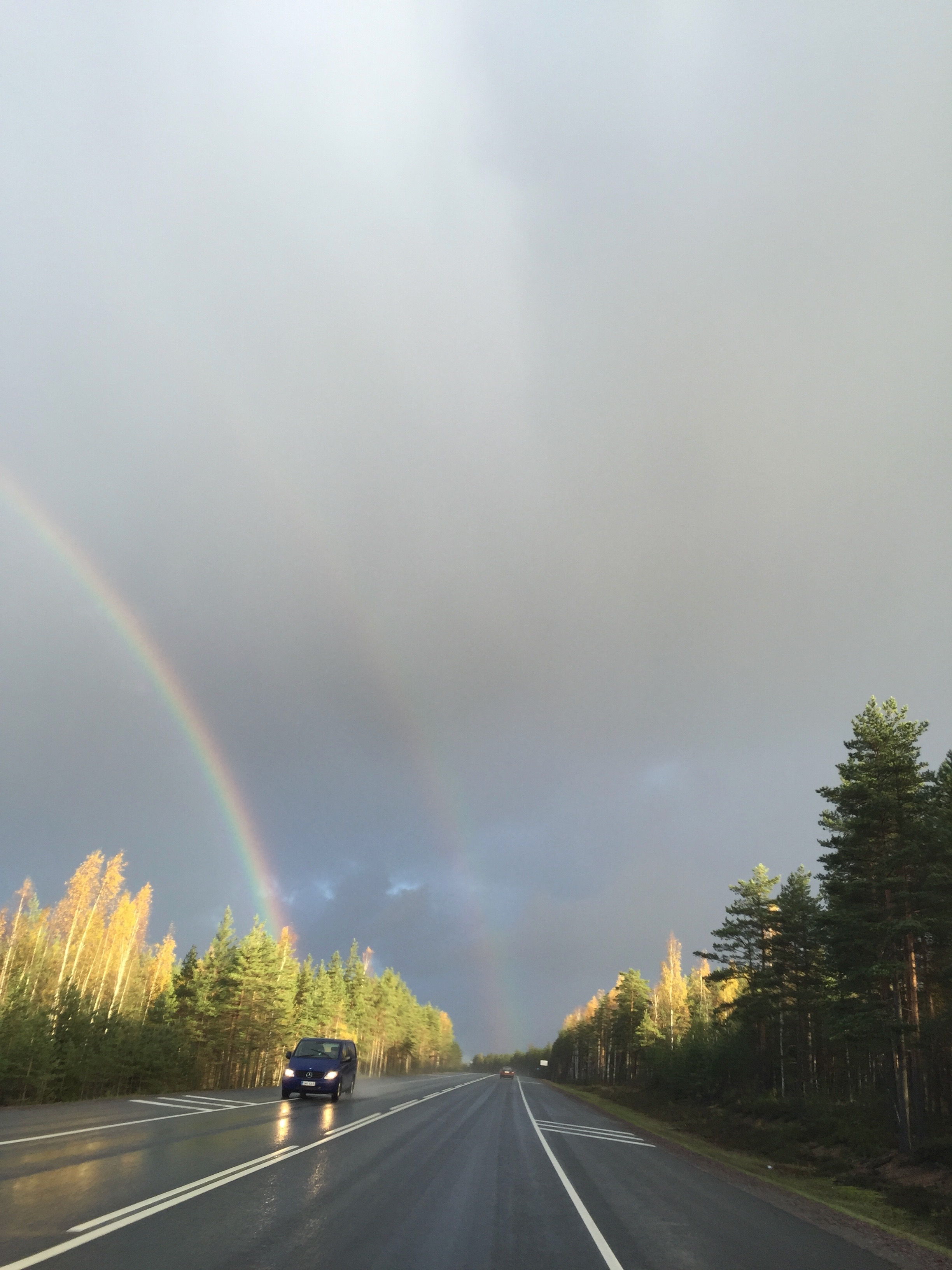 Е18 Скандинавия